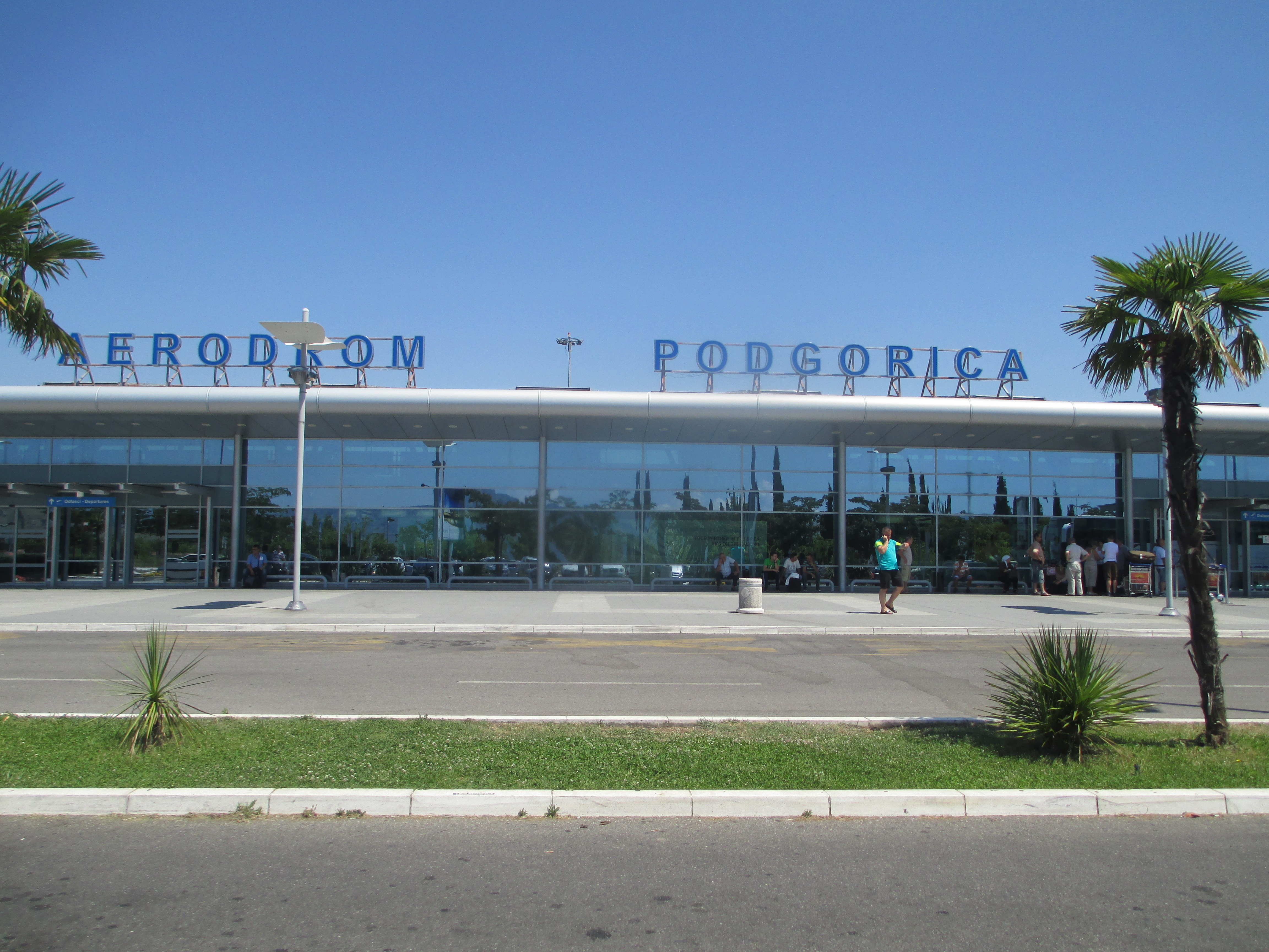 נמל התעופה פודגוריצה